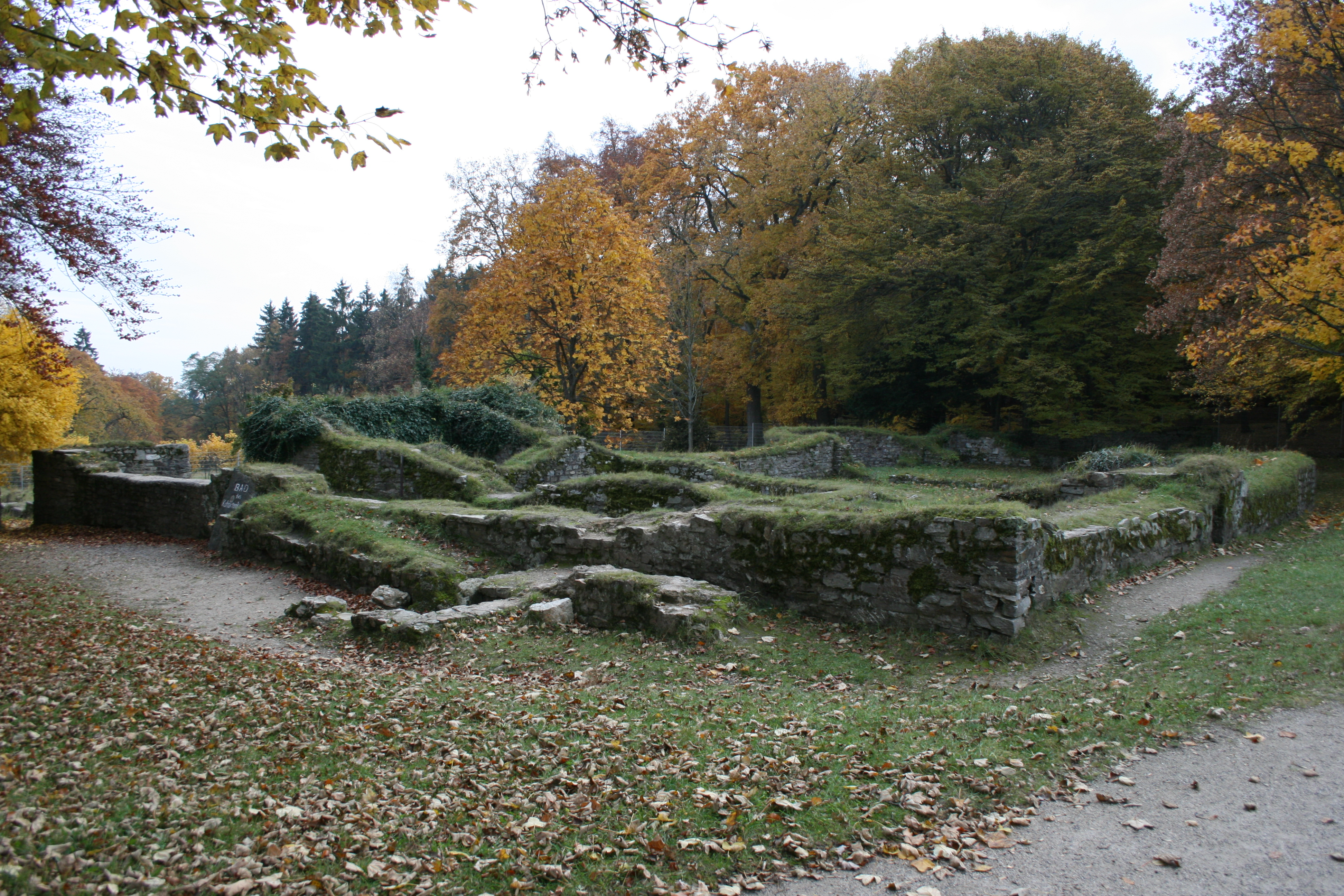 Kastell Saalburg, Ansicht des Kastellbades